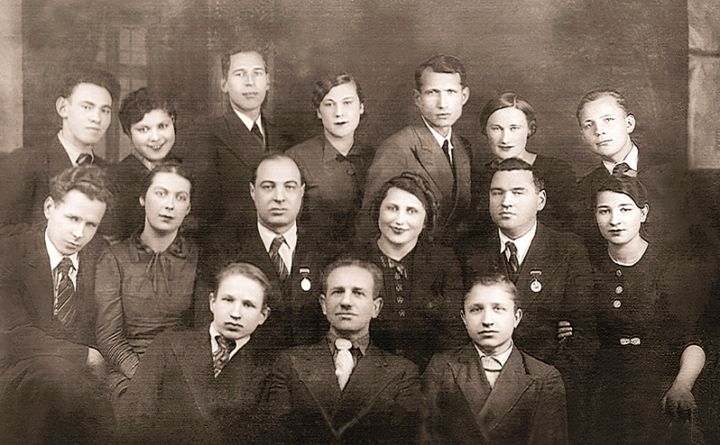 Рыгор Самохін з артыстамі аркестра народных інструментаў БССР. У цэнтры яго — дырыжор аркестра Рыгор Самохін і “закадычны” напарнік Іосіфа Жыновіча Станіслаў Навіцкі з медалямі “За працоўную адзнаку” на грудзях. Сам Жыновіч сядзіць збоку (першы злева ў другім шэрагу)